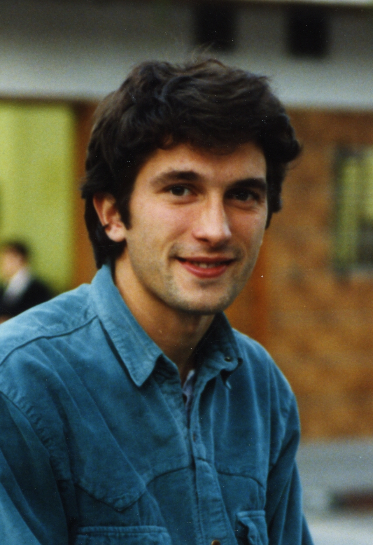 Andoni Imaz. Aiurri 7 zbk. 28. orr.